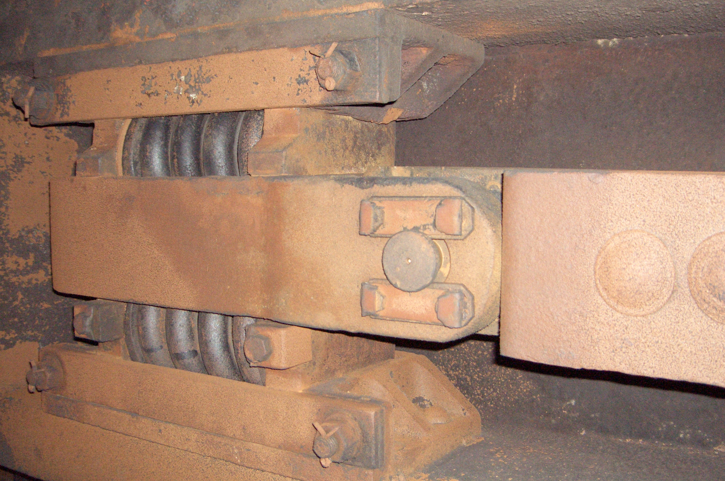 日本国有鉄道 D52468 連結器、梅小路蒸気機関車館にて撮影